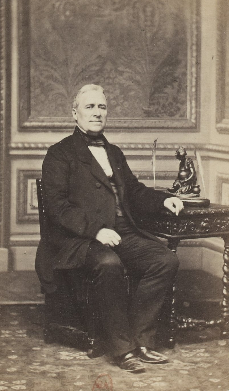 Album des députés au Corps législatif entre 1852-1857.